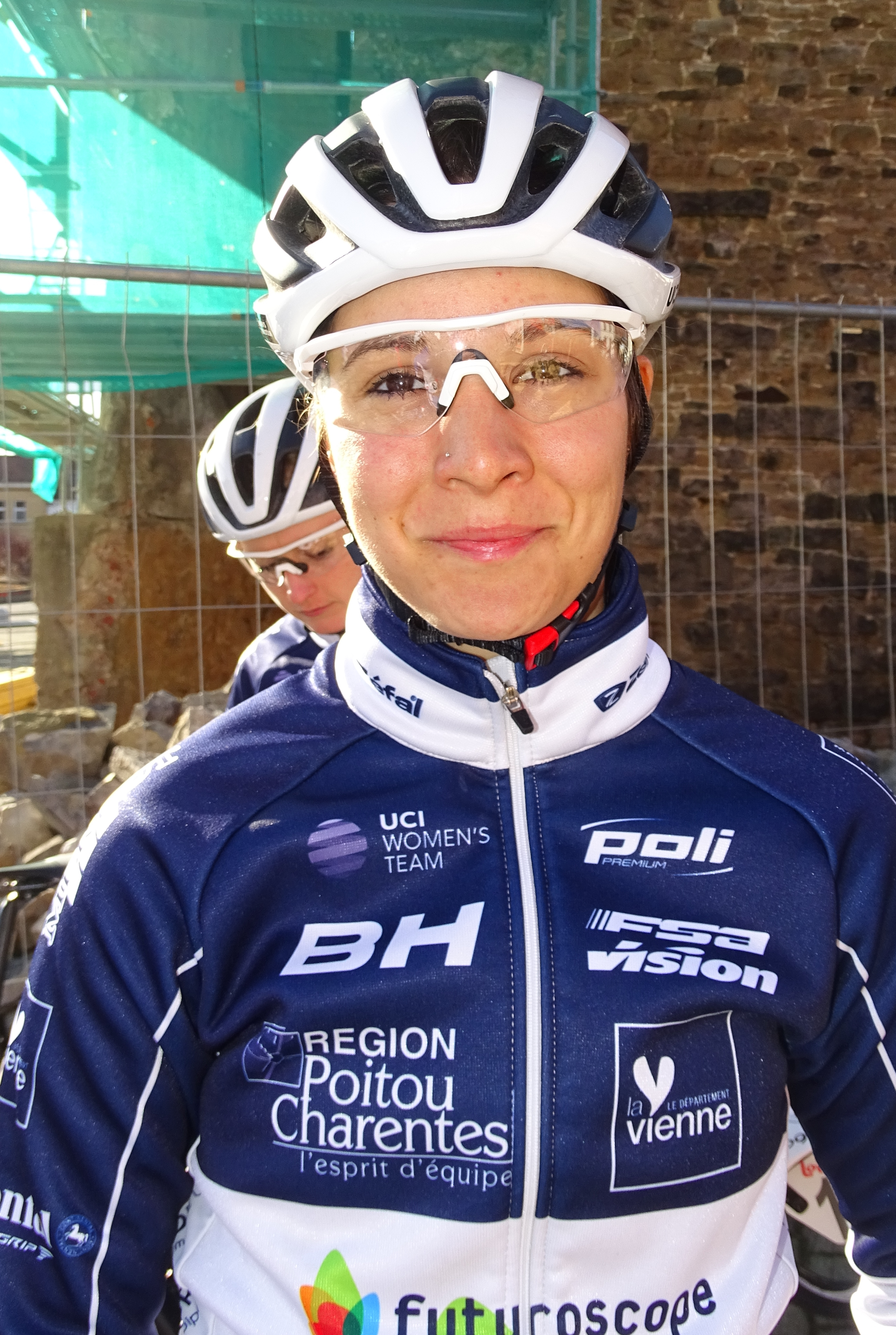 Reportage réalisé le mercredi 2 mars à l'occasion du départ du Samyn des Dames 2016 et du Samyn 2016 à Quaregnon, Belgique.